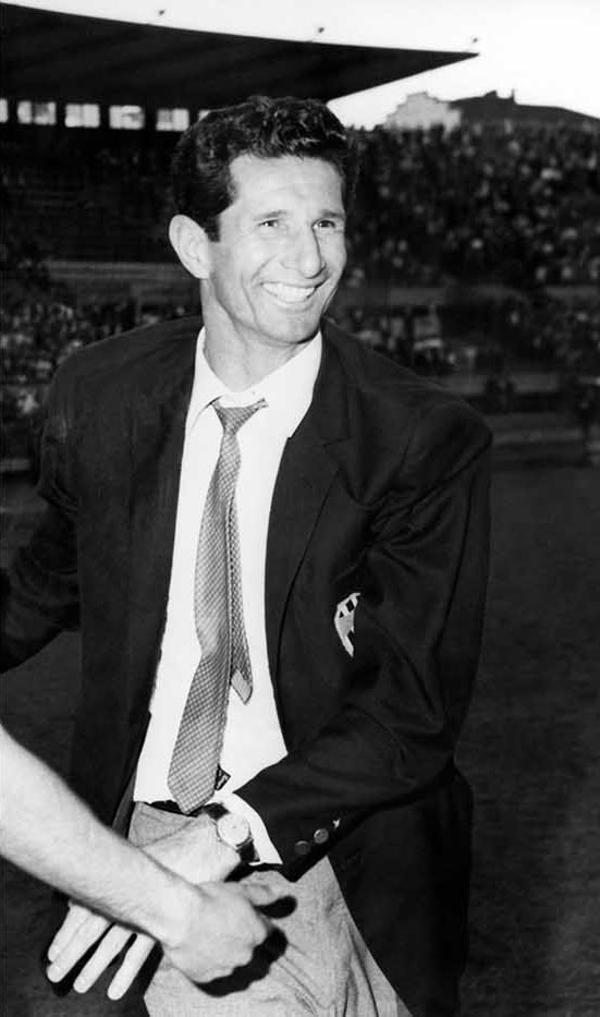 Torino, stadio Comunale, 1º giugno 1967. Al termine della sfida tra Juventus e Lazio (2-1) valevole per la 34ª e ultima giornata del campionato italiano di Serie A 1966-67, l'allenatore juventino Heriberto Herrera festeggia la vittoria dello scudetto; un successo arrivato anche grazie alla contemporanea sconfitta della rivale Inter sul campo del Mantova (0-1), che ha permesso il sorpasso in classifica da parte juventina.